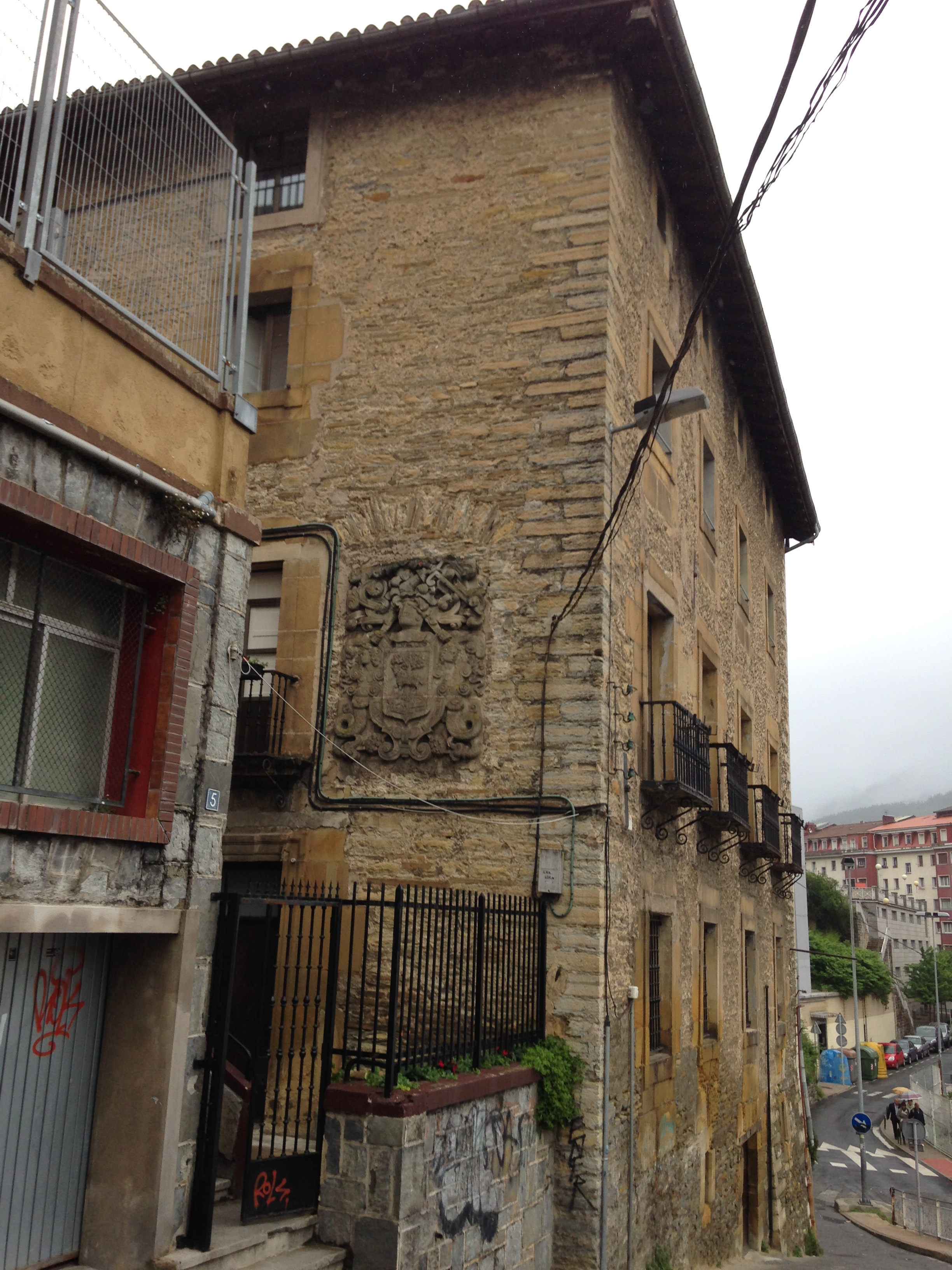 Palacio de Aldatze en Eibar (Gipuzkoa) País Vasco (España).